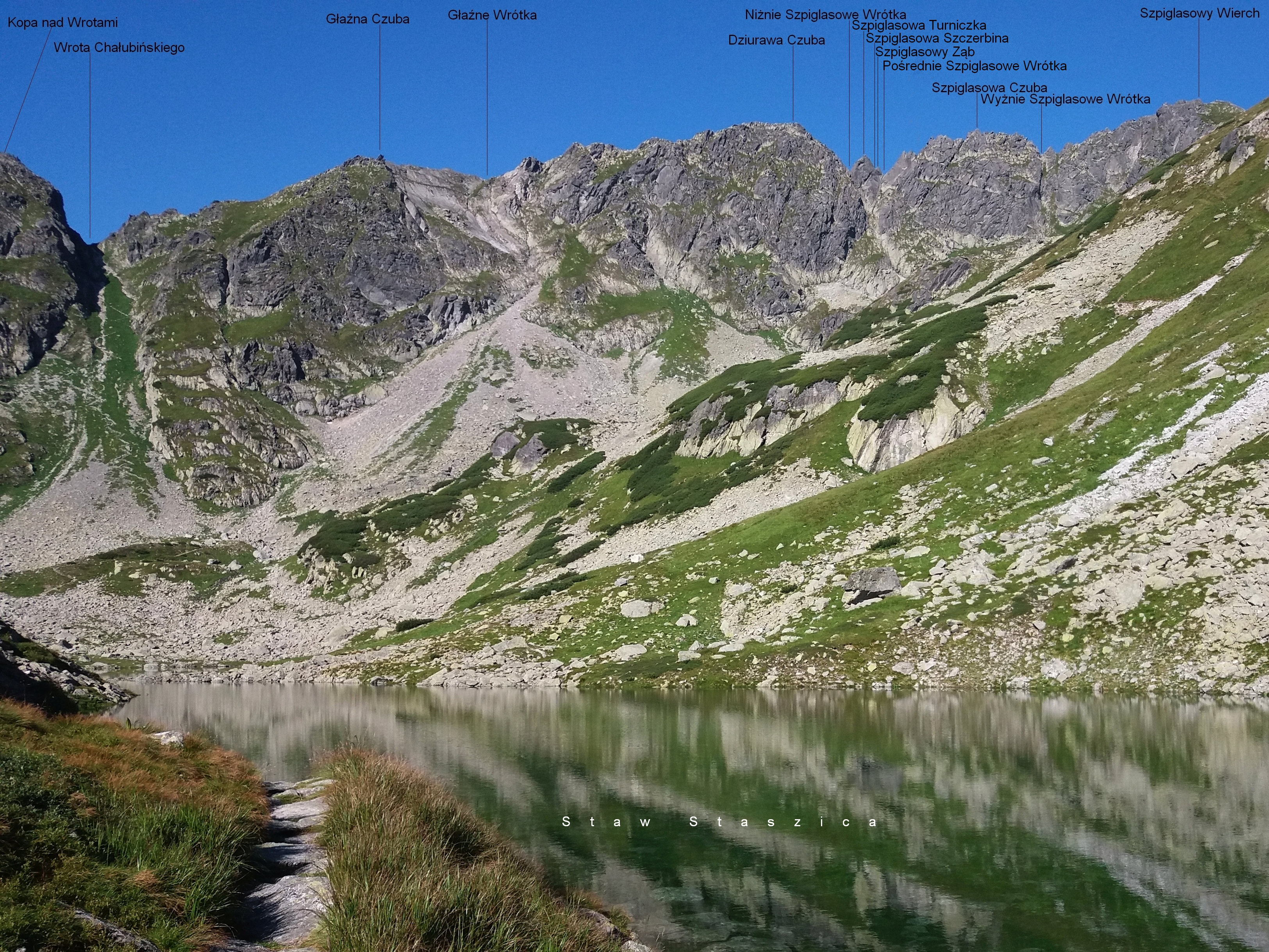 Dolinka za Mnichem i Szpiglasowa Grań